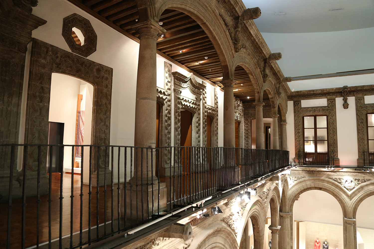 Palacio de Iturbide / Palacio de Cultura Banamex